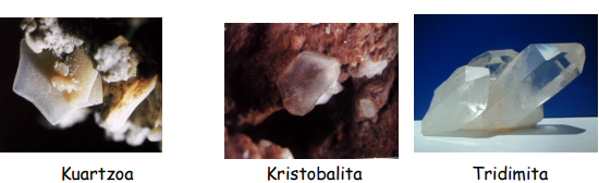 Silizearen hiru egitura polimorfiko